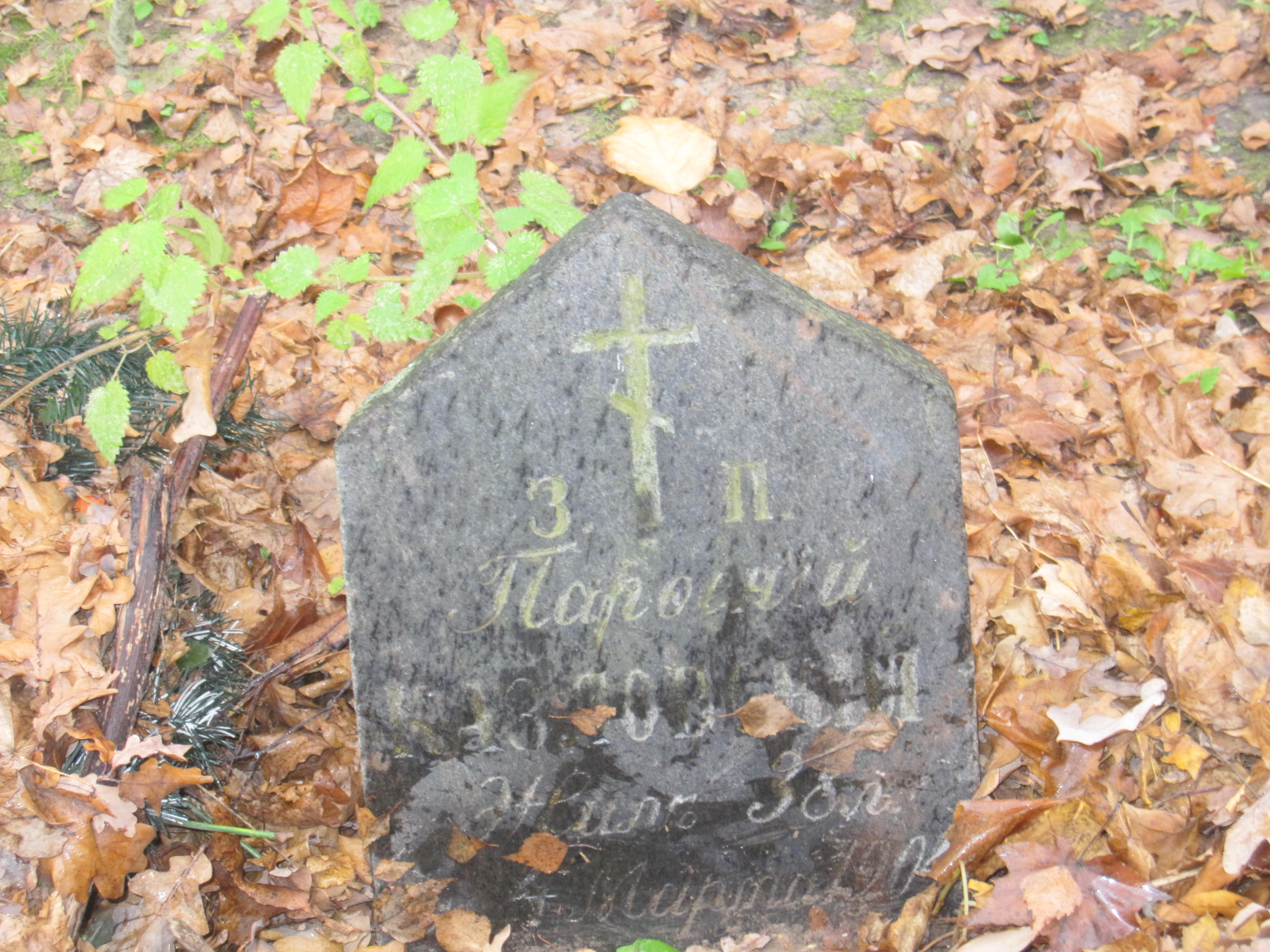 Надмагільны камень на могілках "Пятроўшчына", 1904 год, Мінск.